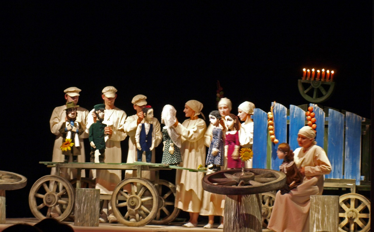 Гомельский государственный театр кукол на фестивале «Белгородская забава 2012». Спектакль «Поминальная молитва».